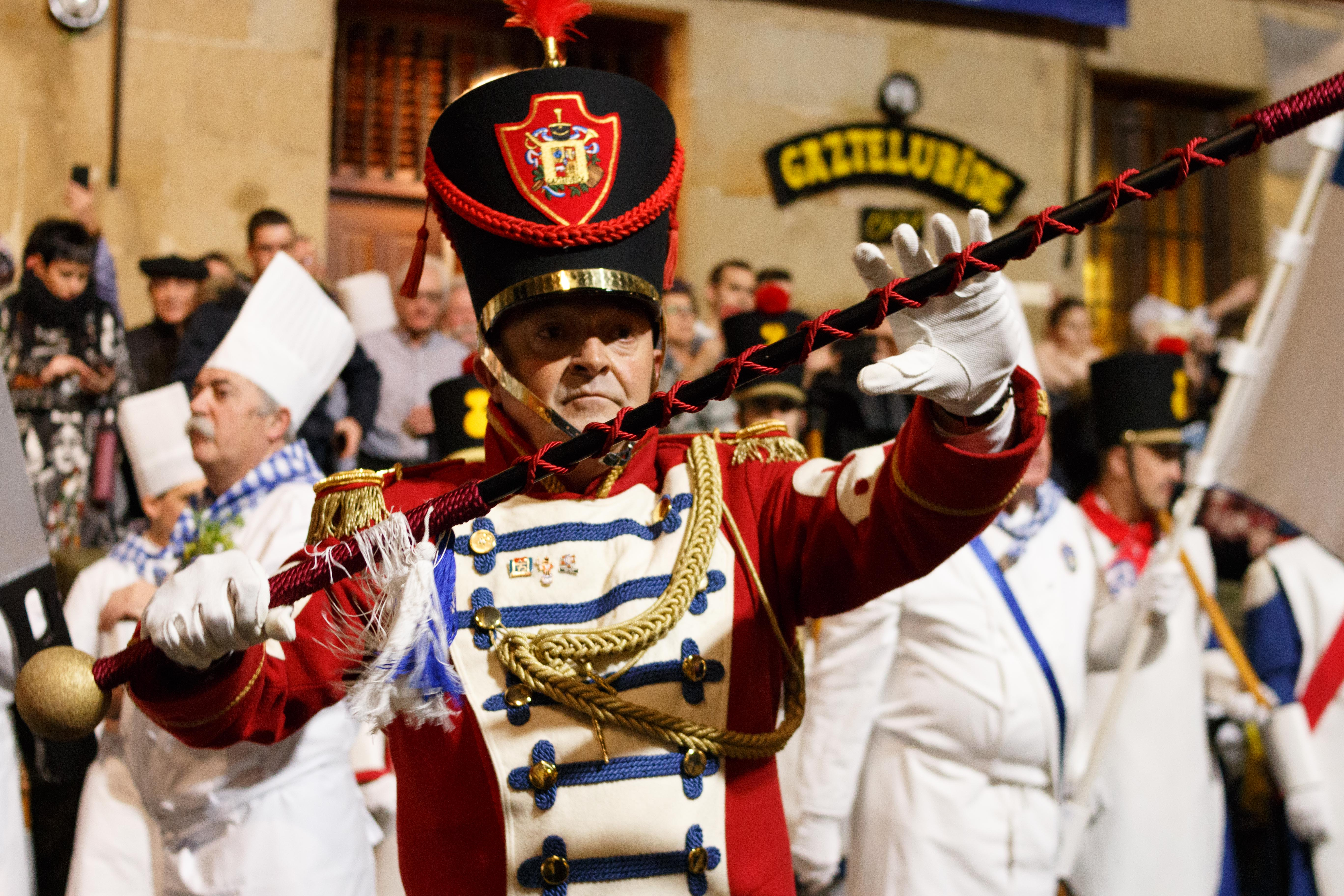 Donostiako danborrada This is a photography of a Folklore festival in Spain (Wikidata id Q2613306).